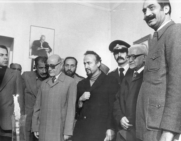 از سمت راست به چپ : داریوش فروهر ، یدالله سحابی ، هاشم صباغیان ، و مهدی بازرگان بر سر مزار محمد مصدق